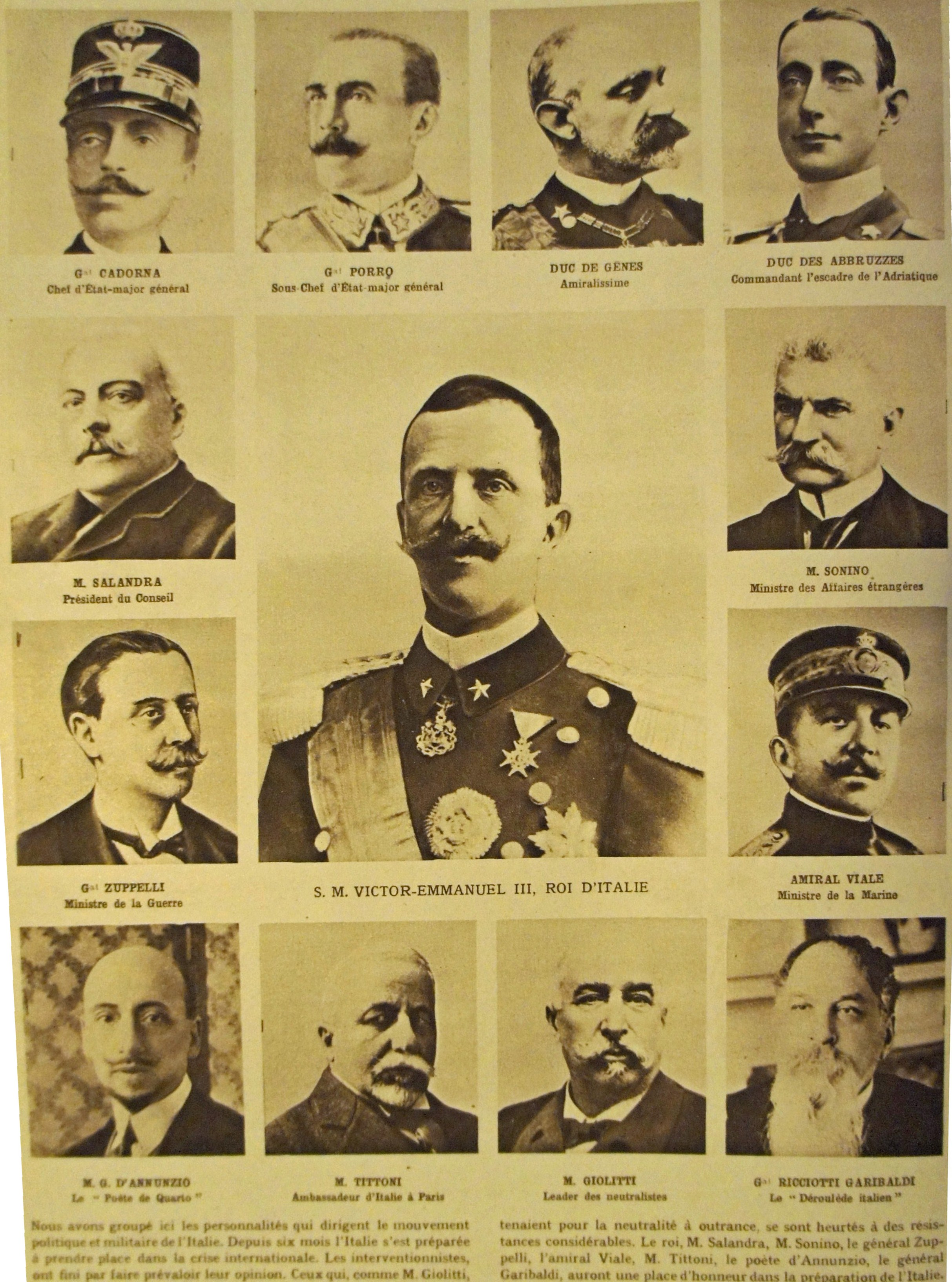 issu du journal "Le Miroir".